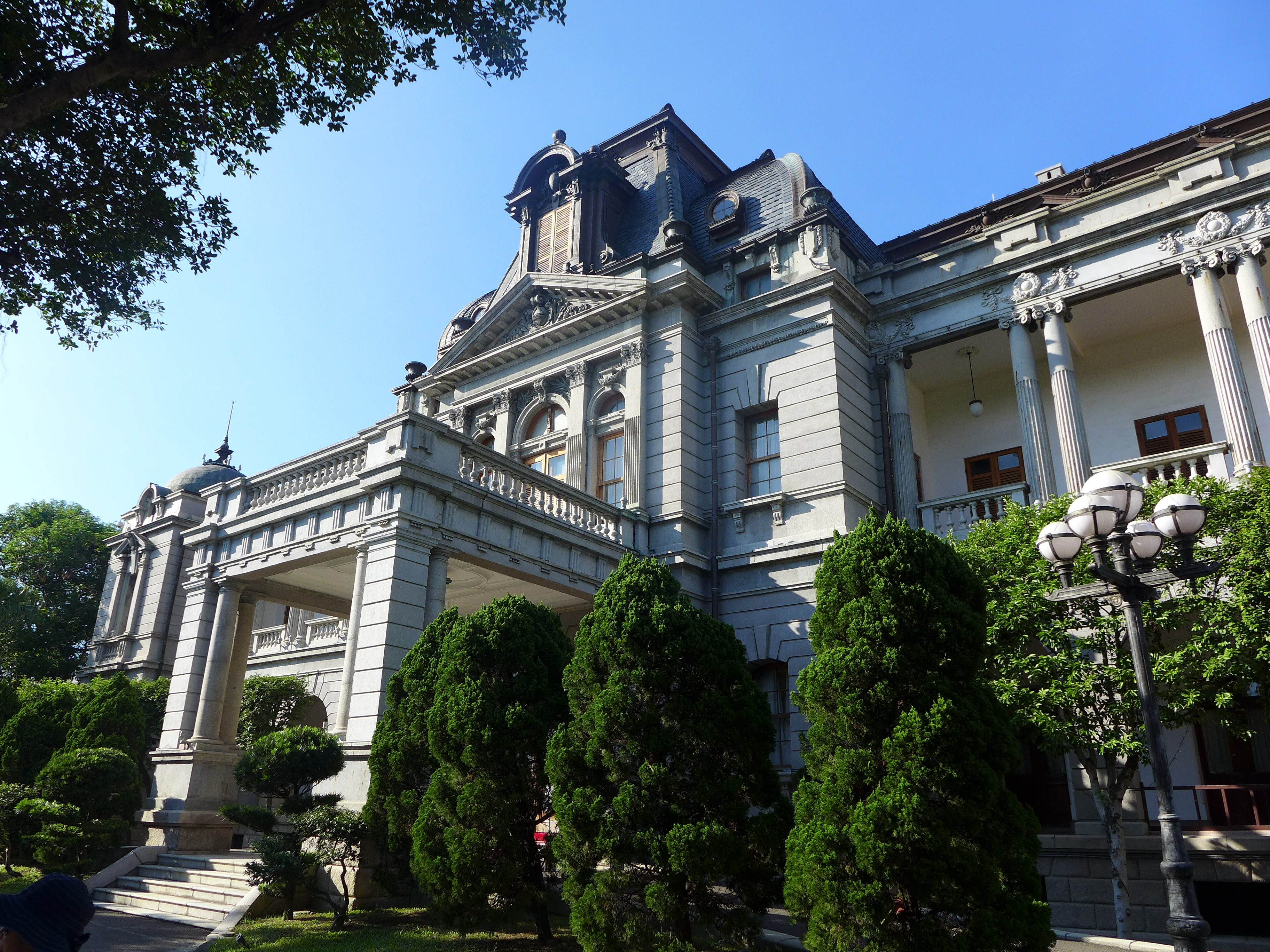 臺北賓館